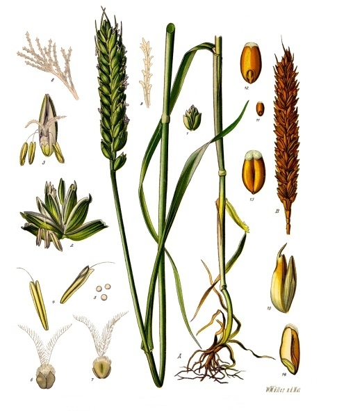 Weizen. A blühende Pflanze des Kolbenweizens, natürl. Grösse; B reife Aehre, desgl.; 1 Aehrchen vor der Blüthe, desgl.; 2 dasselbe blühend und auseinandergebreitet, vergrössert; 3 Blüthe mit Hüllspelzen, desgl.; 4 Staubgefässe, desgl.; 5 Pollen, desgl.; 6 und 7 Fruchtknoten mit Saftschuppen; 8 und 9 Theile der Narbe; 10 Fruchtspelzen; 11, 12, 13 Same, natürl. Grösse und vergrössert; 14 derselbe zerschnitten, vergrössert.